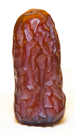 خرمای پیارم